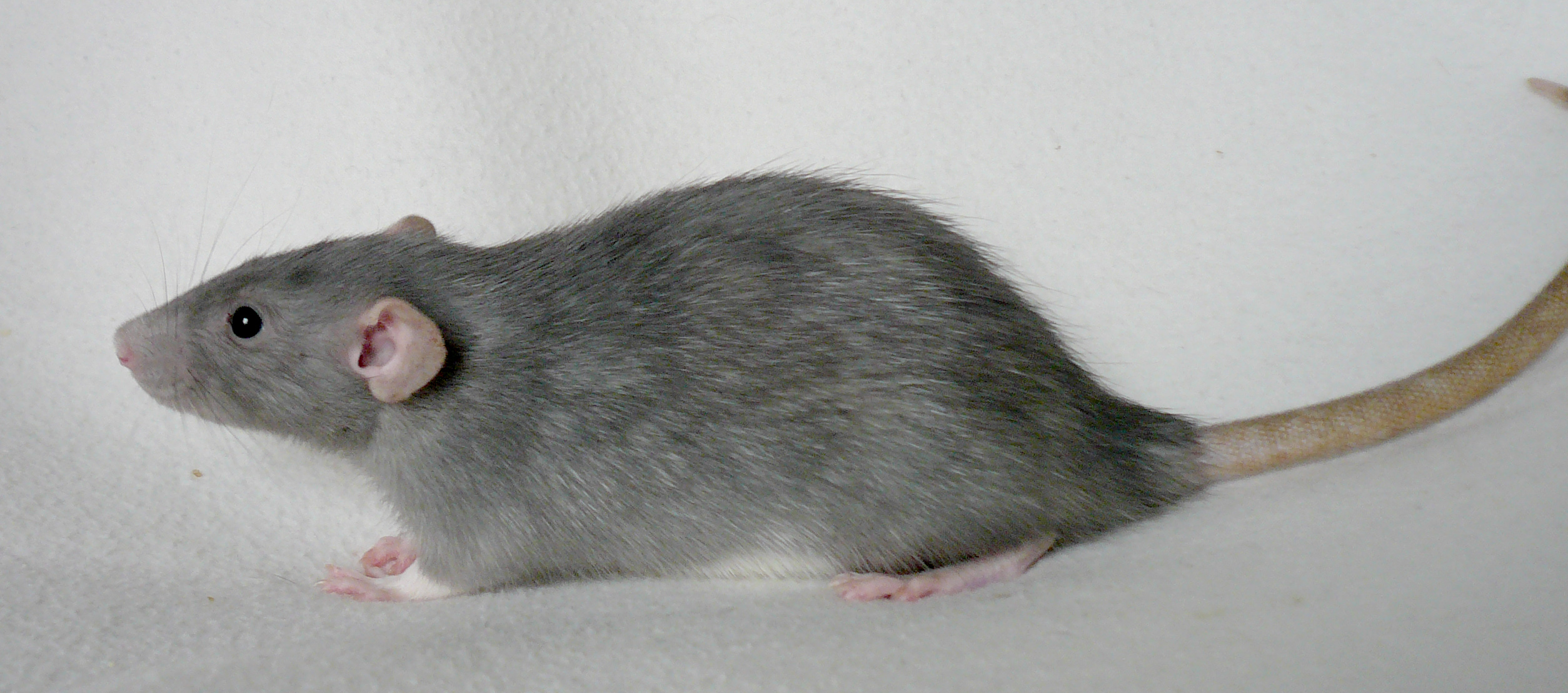 Dumbo- Ratte im Profil. Typ: Endlich Blue Self Dumbo